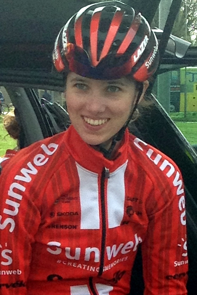 Volta Limburg Classic 2019 voor vrouwen met start en finish in Eijsden, Limburg, Nederland